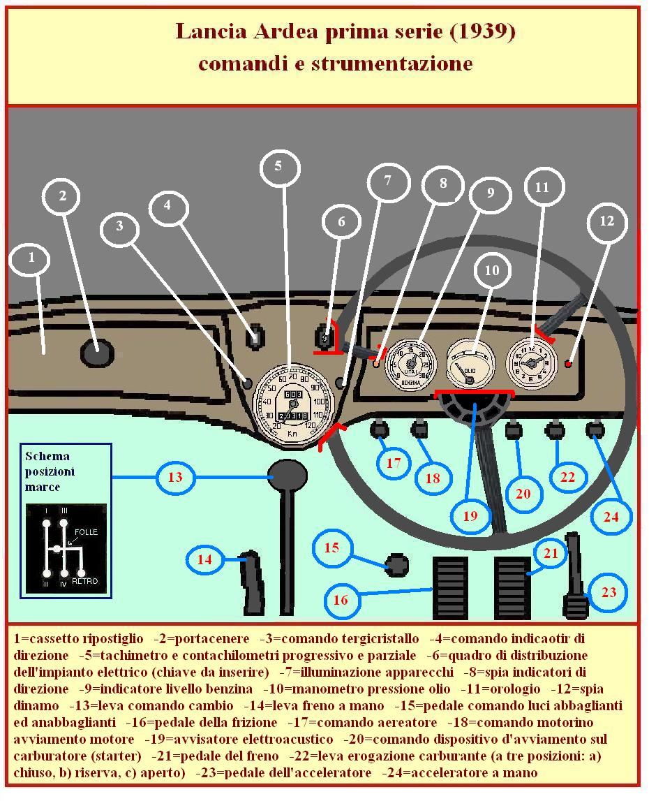 Disegno eseguito dal sottoscritto (Giomayo) utilizzando il programma "Paint" di Windows ispirandomi (ed attingendo i dati necessari) da una serie di pubblicazioni, tra cui principalmente la rivista Quattroruote numero 7 dell'anno 1959